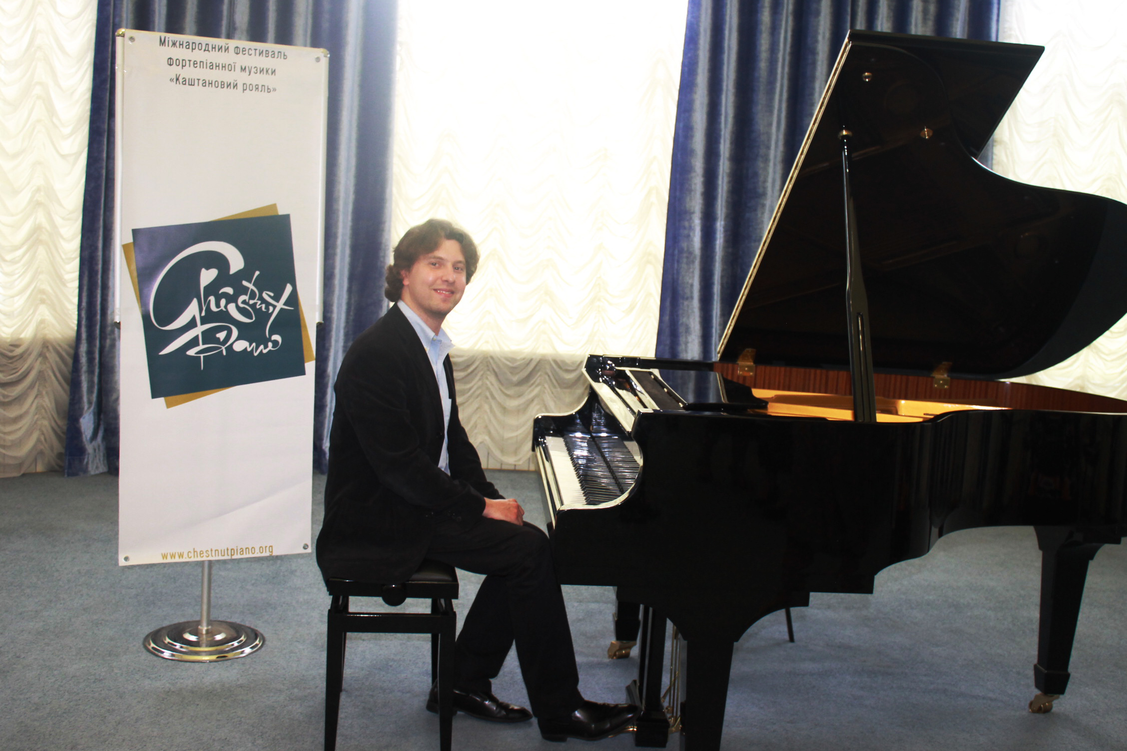 Павло Гінтов, український піаніст. Фотографія з фестивалю "Каштановий рояль", Київ 2016